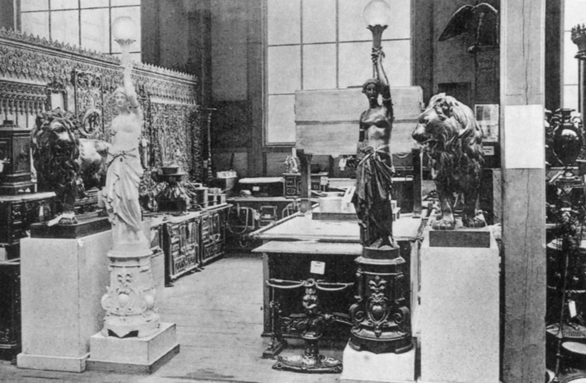 Industrihallen på Stockholmsutställningen 1866, Bolinders avdelning